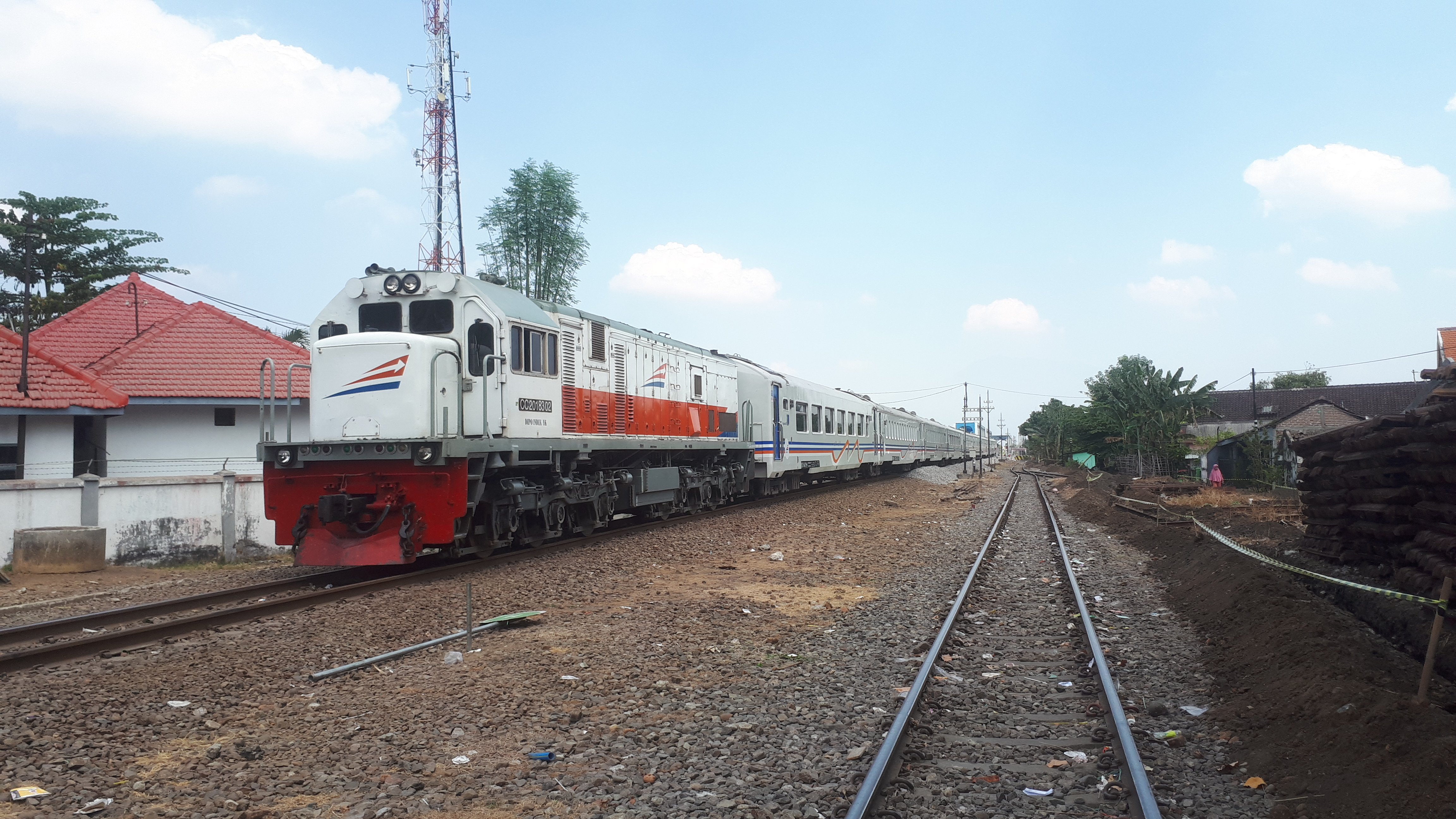 Kereta api Malioboro Ekspres saat akan memasuki Stasiun Madiun